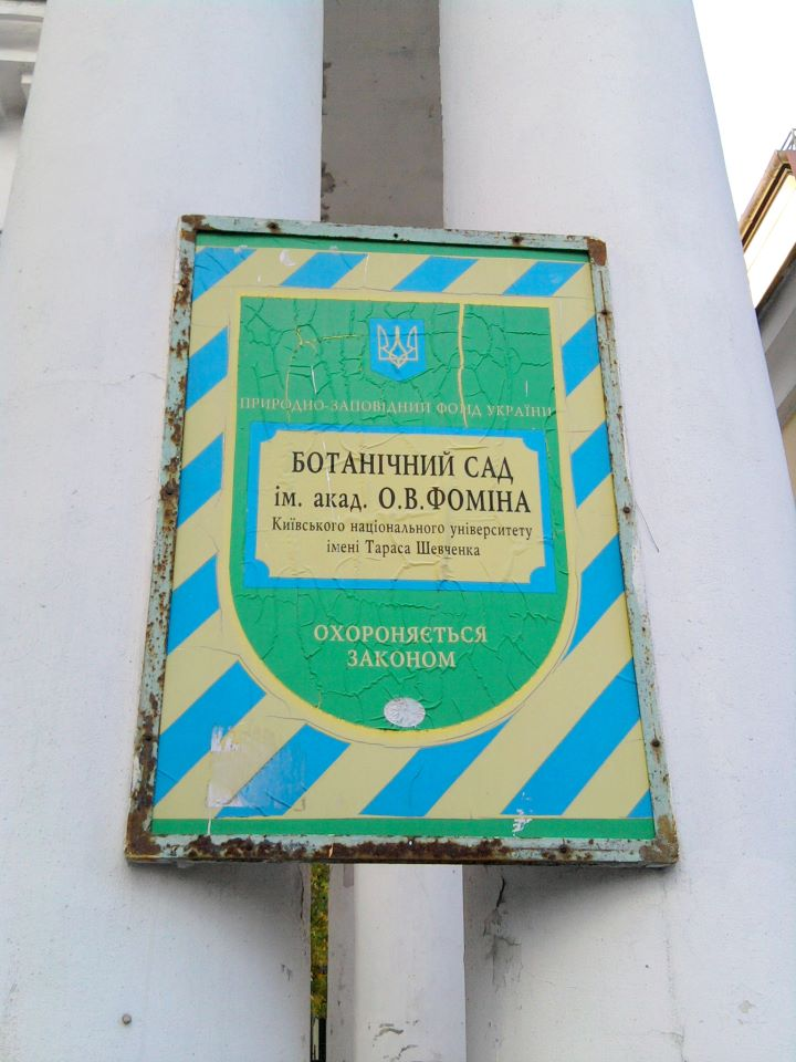 Табличка Ботанический сад имени А. В. Фомина